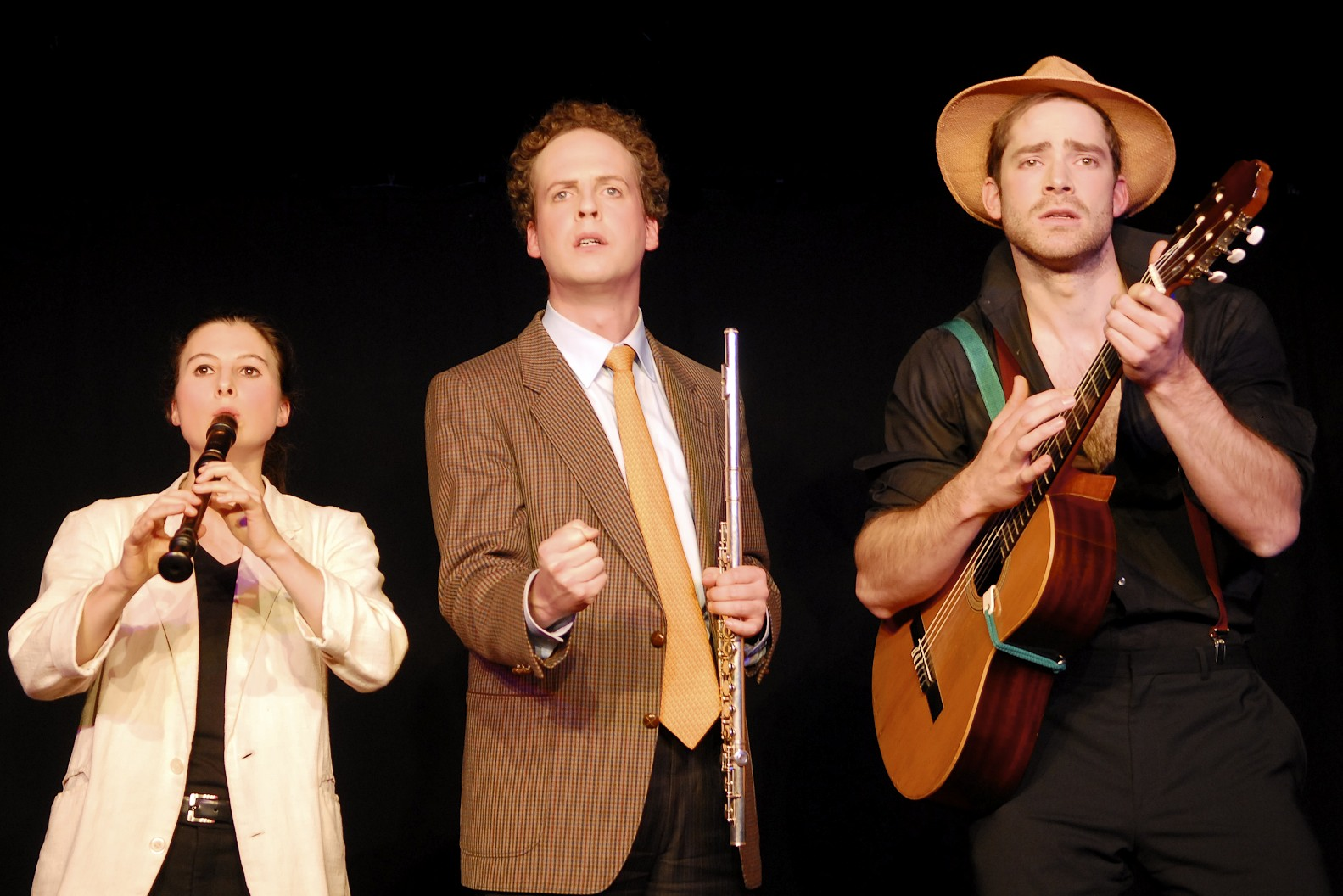 Die Gruppe Riscant bei der Verleihung des Friedl-Brehm-Preises 2011 im Fraunhofer-Theater in München (v.l.n.r. Isabelle Scheiber, Ramon Bessel, Christoph Hirschauer